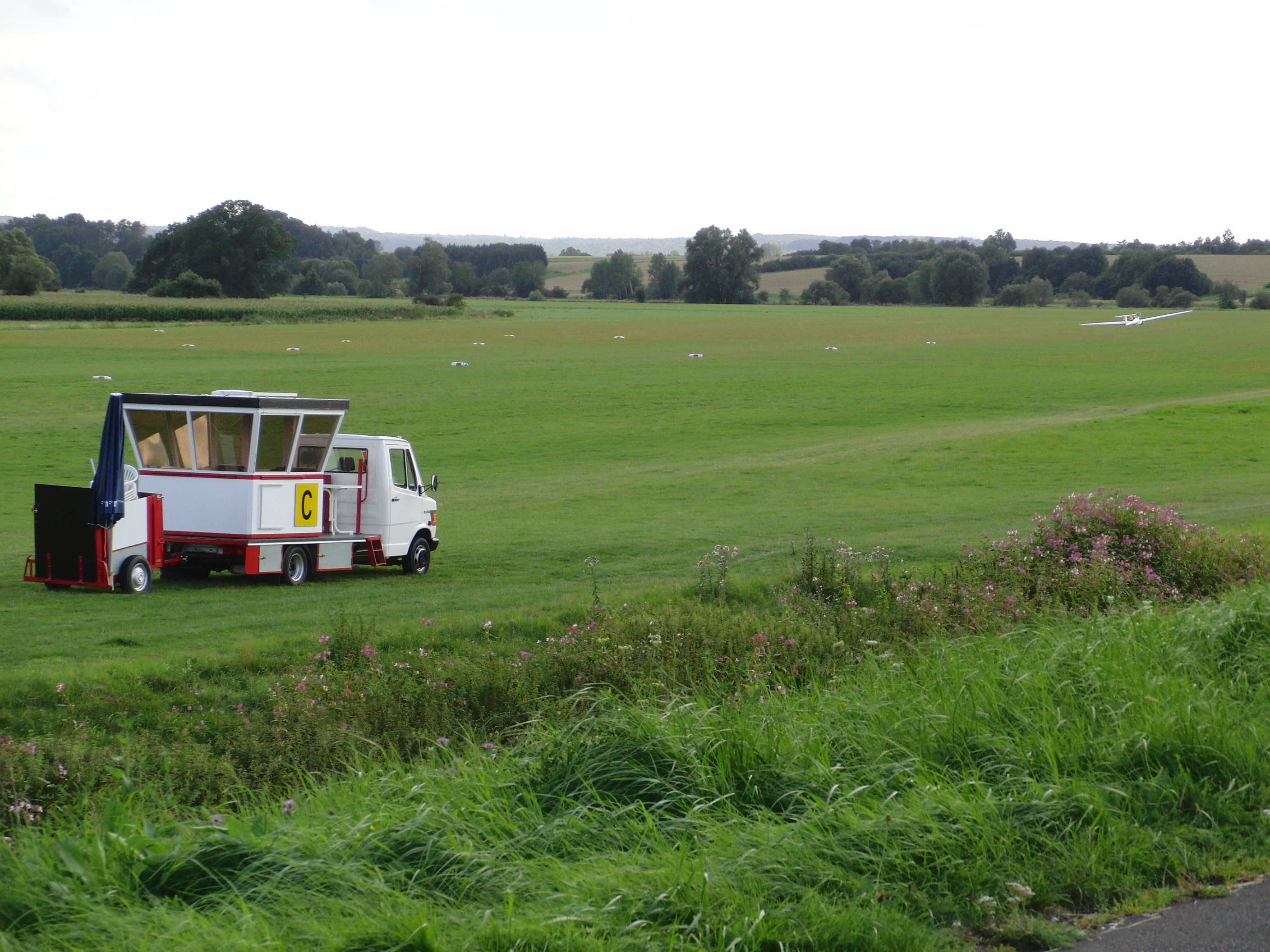 Segelfluggelände Ziegenhain(Hessen), Deutschland